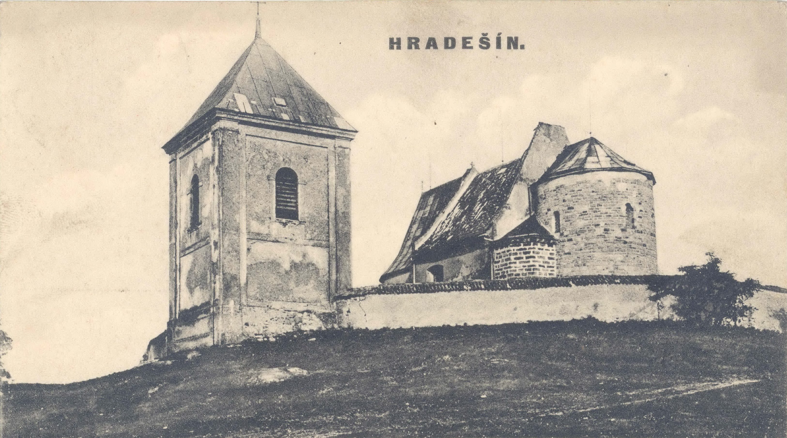 Kostel svatého Jiří s kaplí a farou, Hradešín